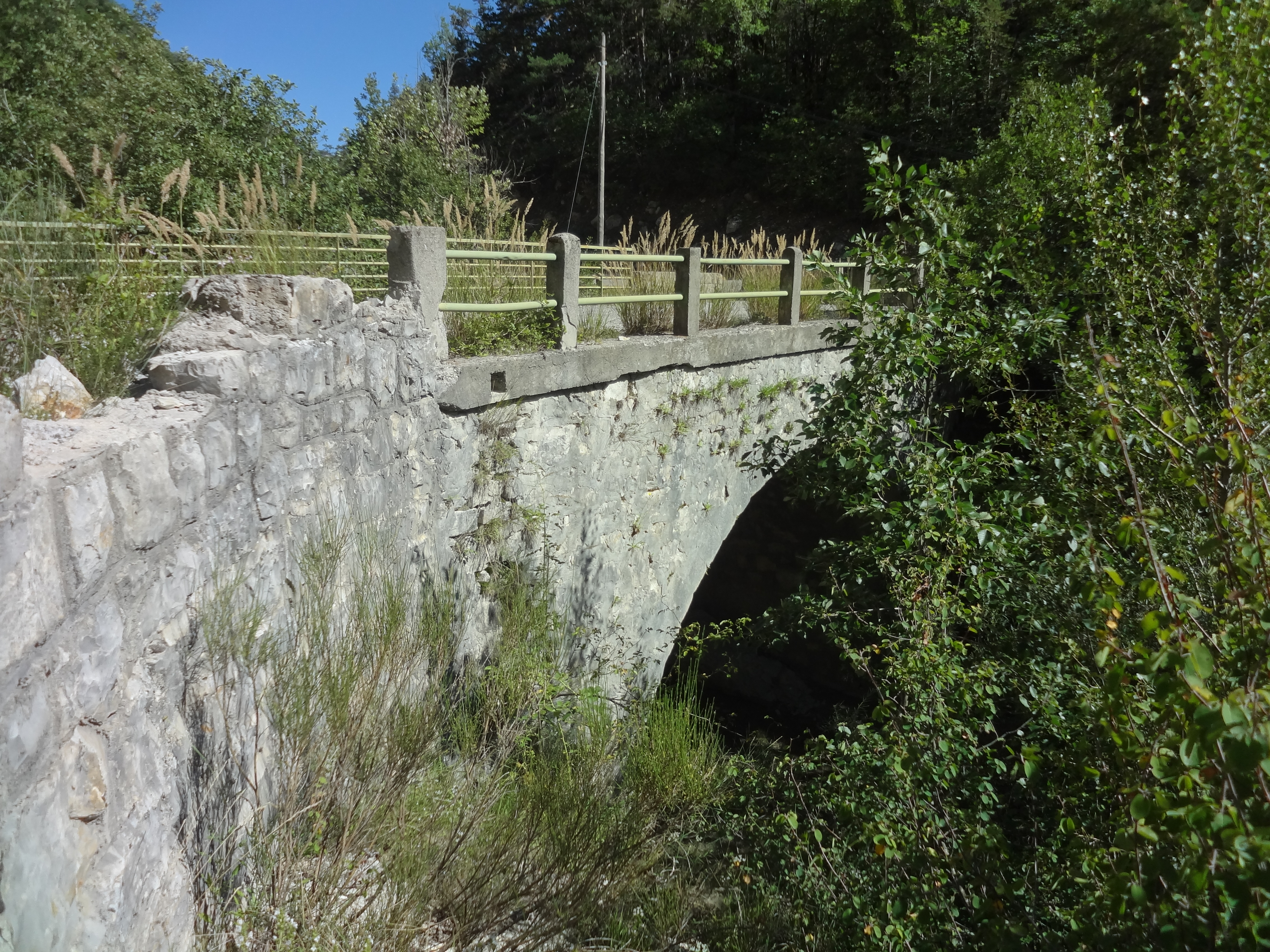 Pont franchissant le ruisseau de la Bernarde et autrefois emprunté par la RD 10 et abandonné quand le tracé rive droite, trop exposé aux chutes de pierres, a été délaissé au profit du tracé rive gauche